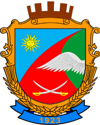 Герб Гайсинського району